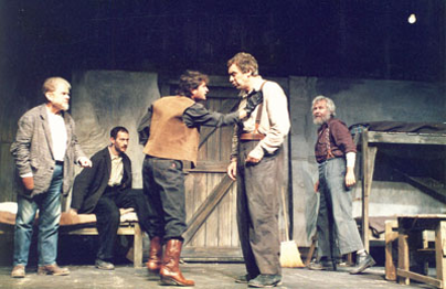 תפאורה ההצגה "על עכברים ואנשים" בעיצובו של משה שטרנפלד